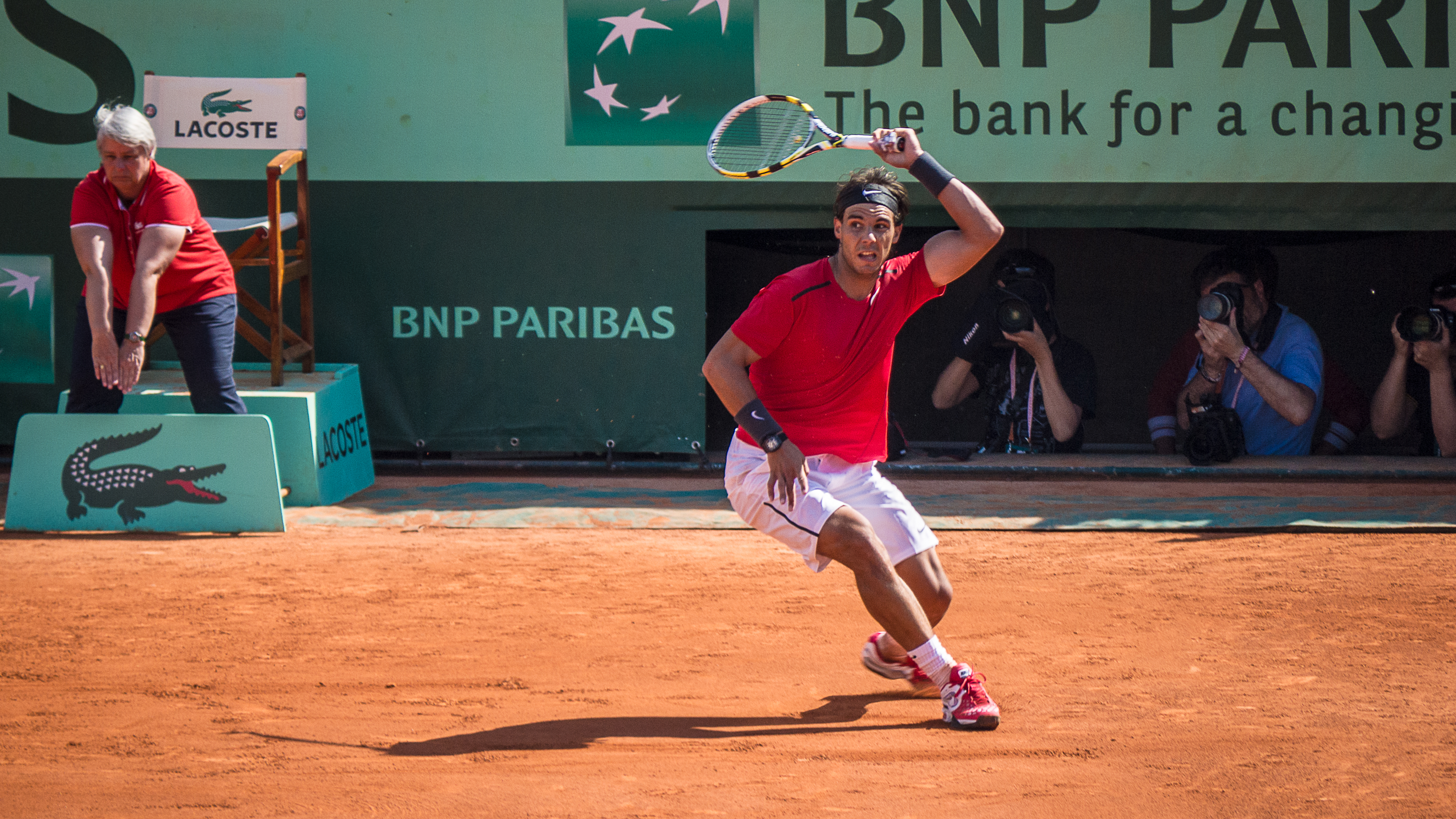 1er tour Roland Garros 2012 : Rafael Nadal (ESP) def. Simone Bolelli (ITA) 2012 Roland Garros.